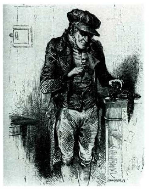 Gosbeck lukuraria, «Comedie Humaine»-rako irudia.